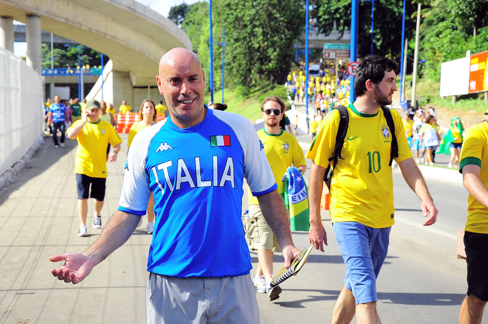 Manifestações de junho de 2013 em Salvador, Bahia, Brasil.